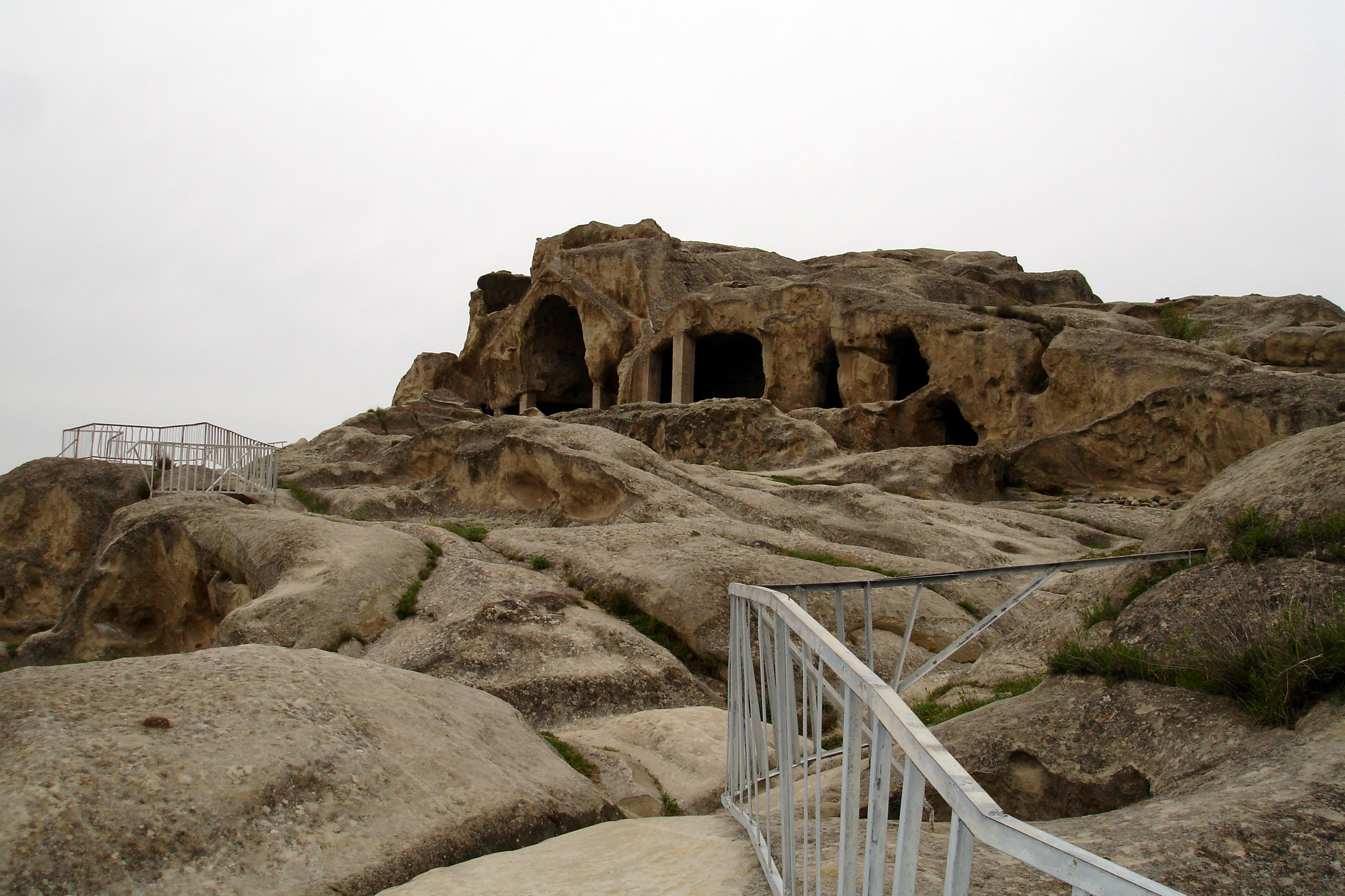 Сучасний вигляд древнього міста Уплісцихе